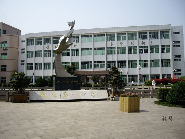 龙港一小进校内